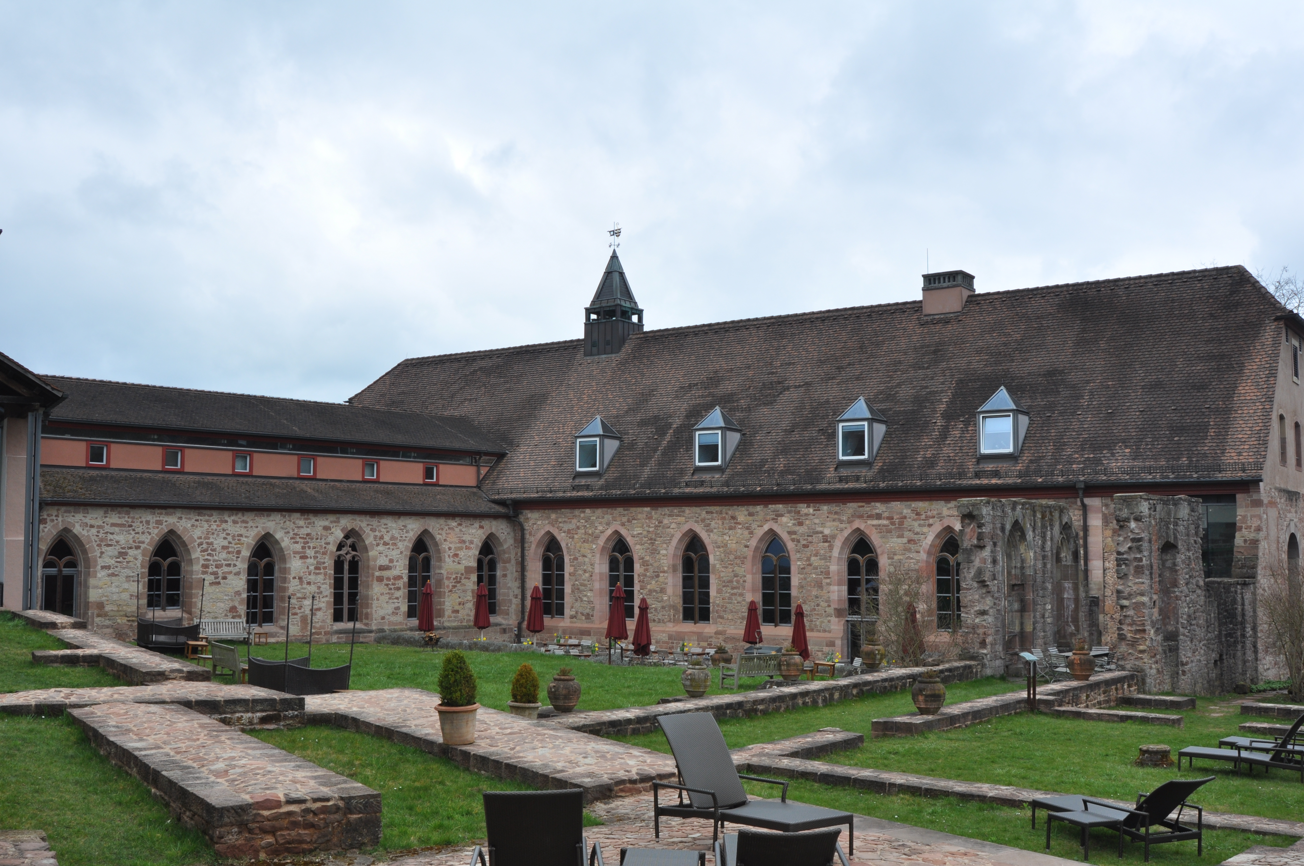 Reste Kloster Hornbach (Konvent), mittlerweile Hotel